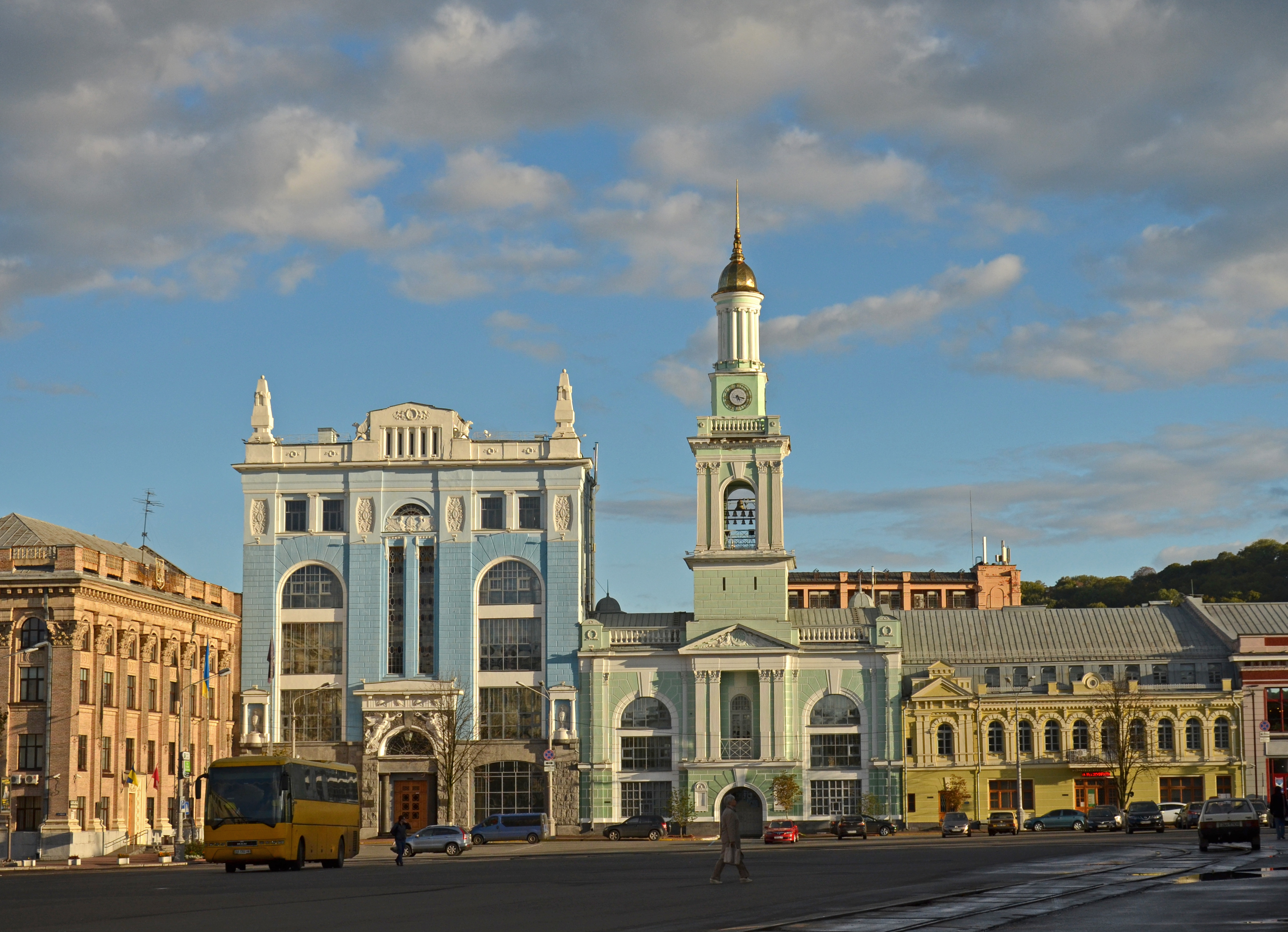 Комплекс Греко-Синайського Свято-Катерининського монастиря, Київ, Контрактова пл., 2